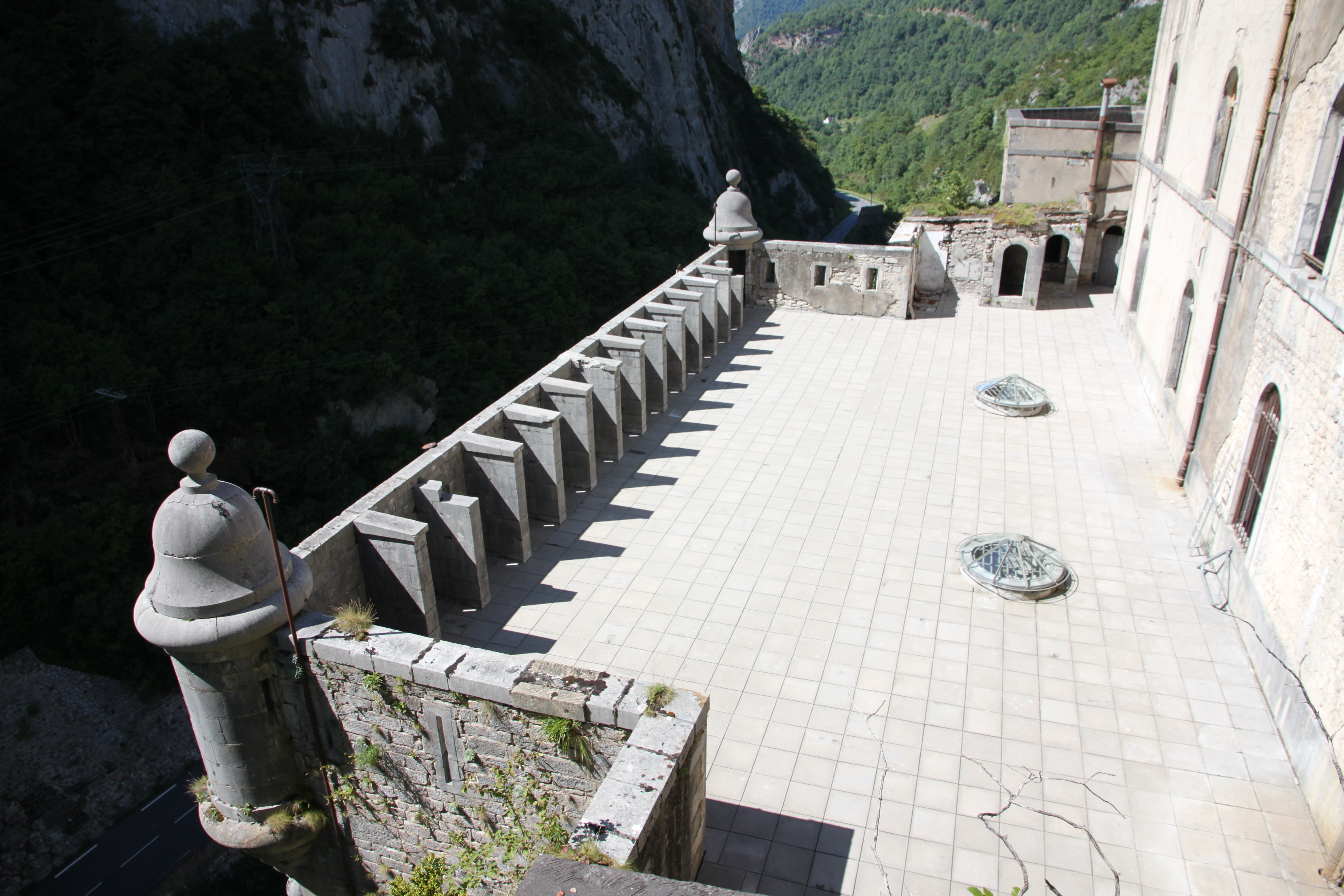 Fort du Portaletfort, prison, pont, route, poste de garde, bureau d'octroi .